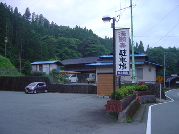 万願寺温泉駐車場